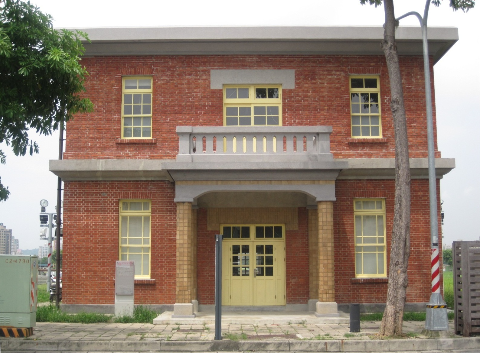 中都唐榮磚窯廠辦公室